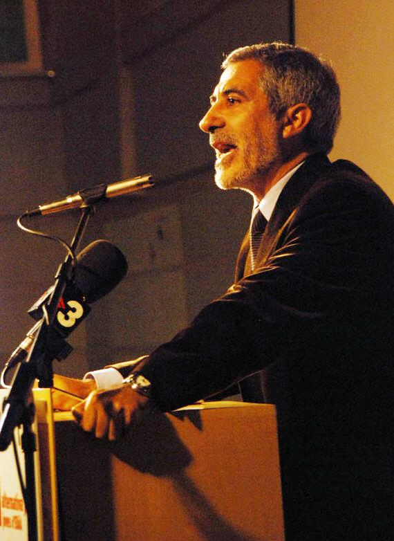 Gaspar Llamazares en la cena-fiesta de EUiA (Barcelona)